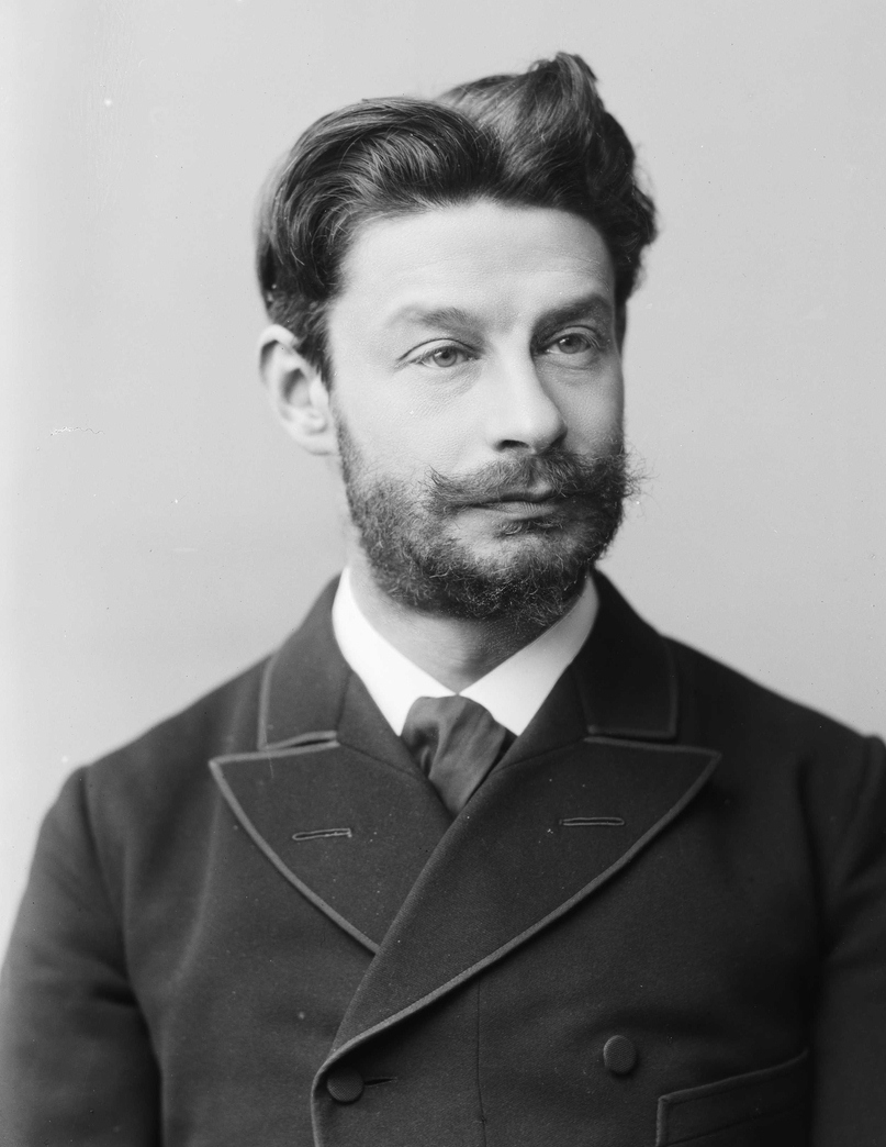 Georg Brandes (1842-1927)